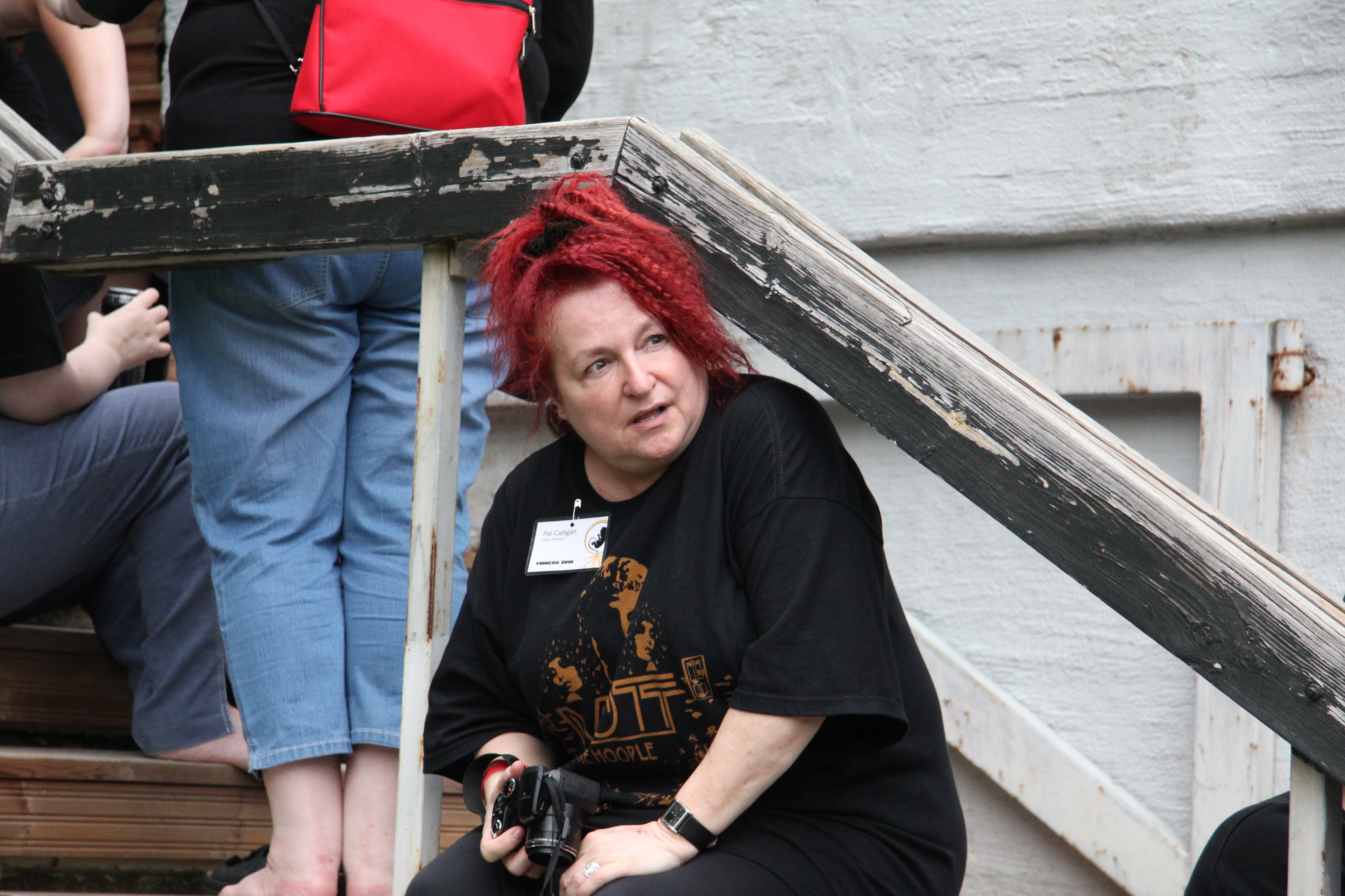 Pat Cadigan at Finncon 2010, Jyväskylä.